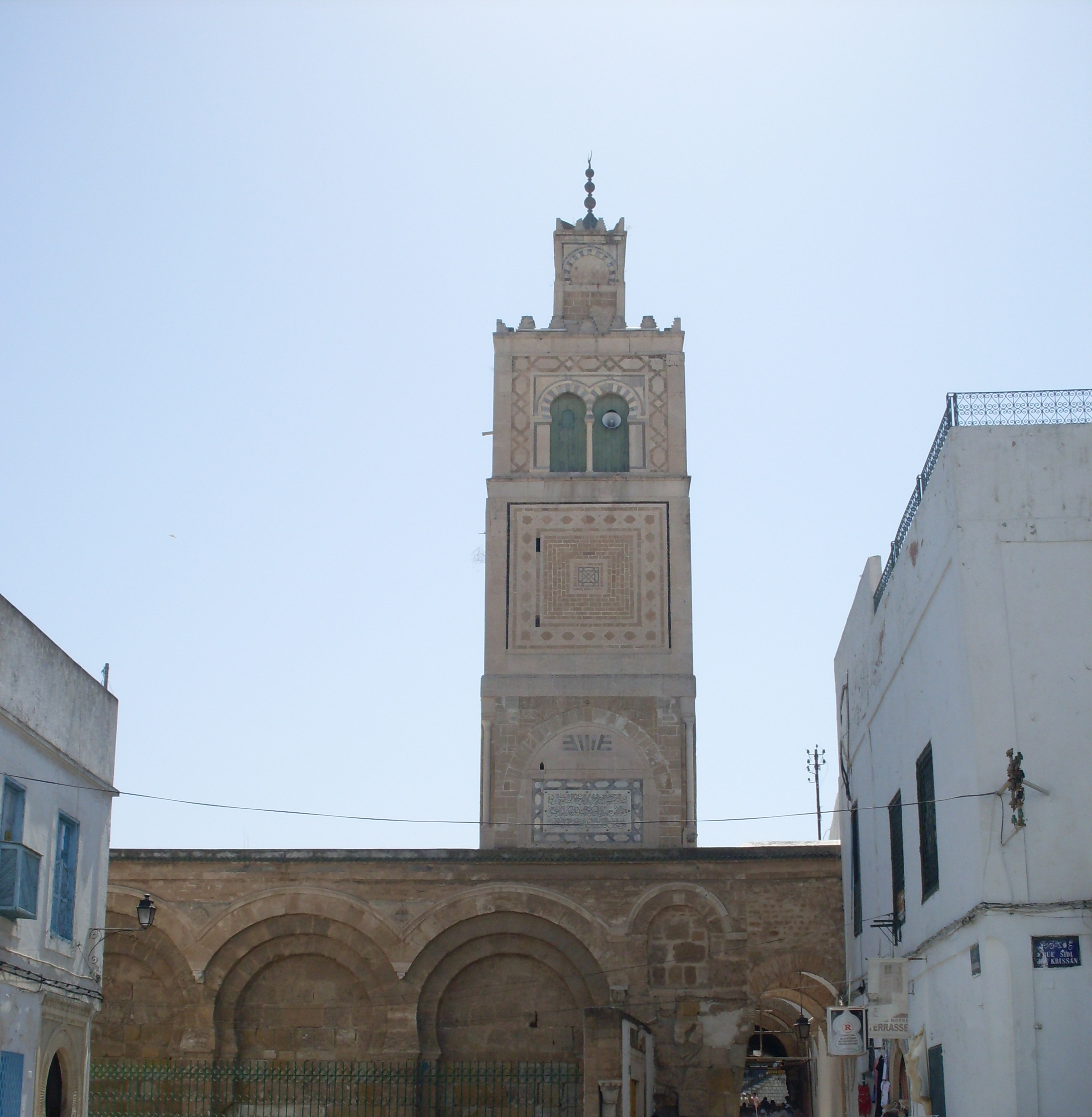 Medina de Tunis, Mosquée El Ksar